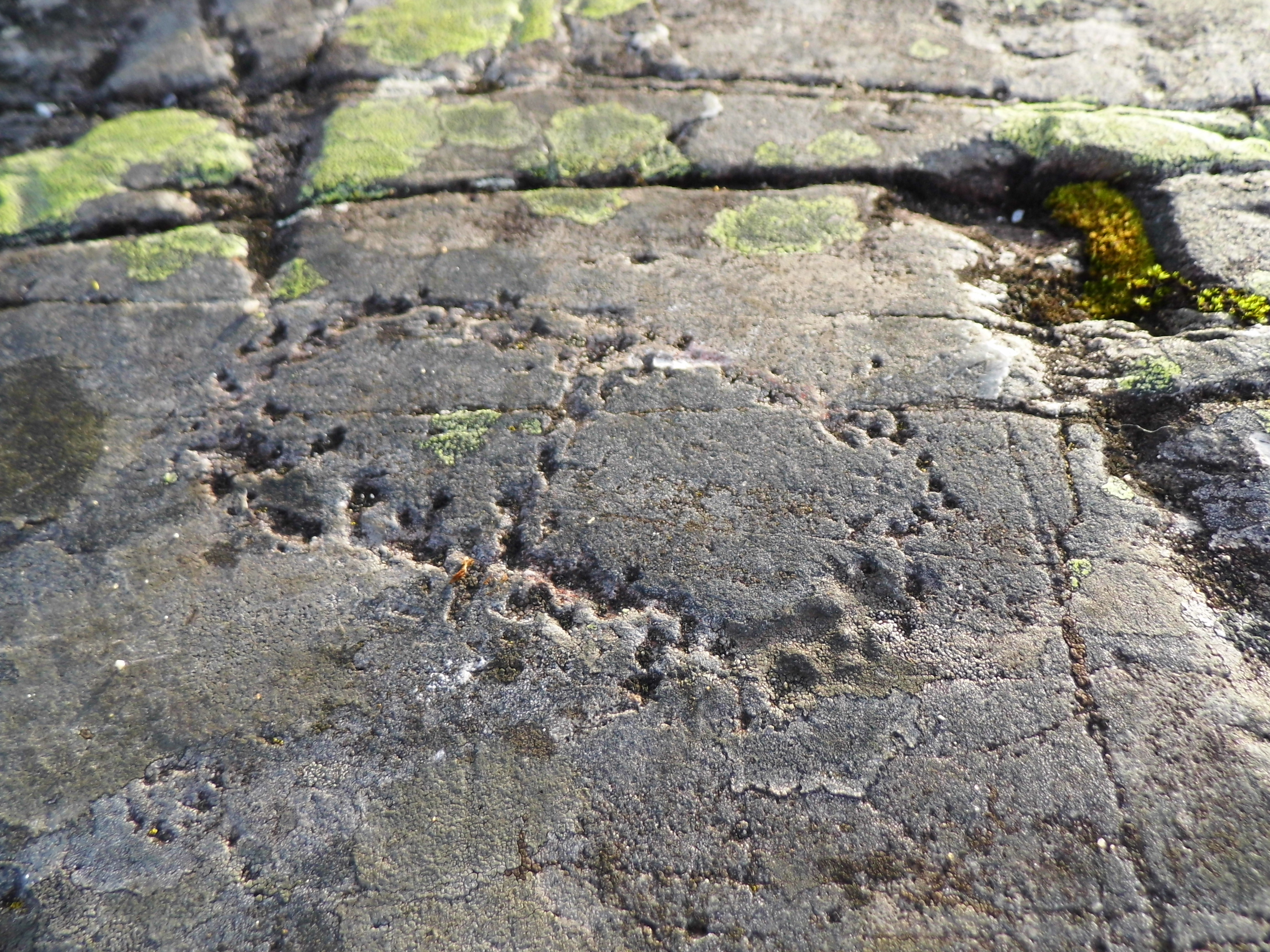 Nærbilde av en prikkhugget fotsåle.